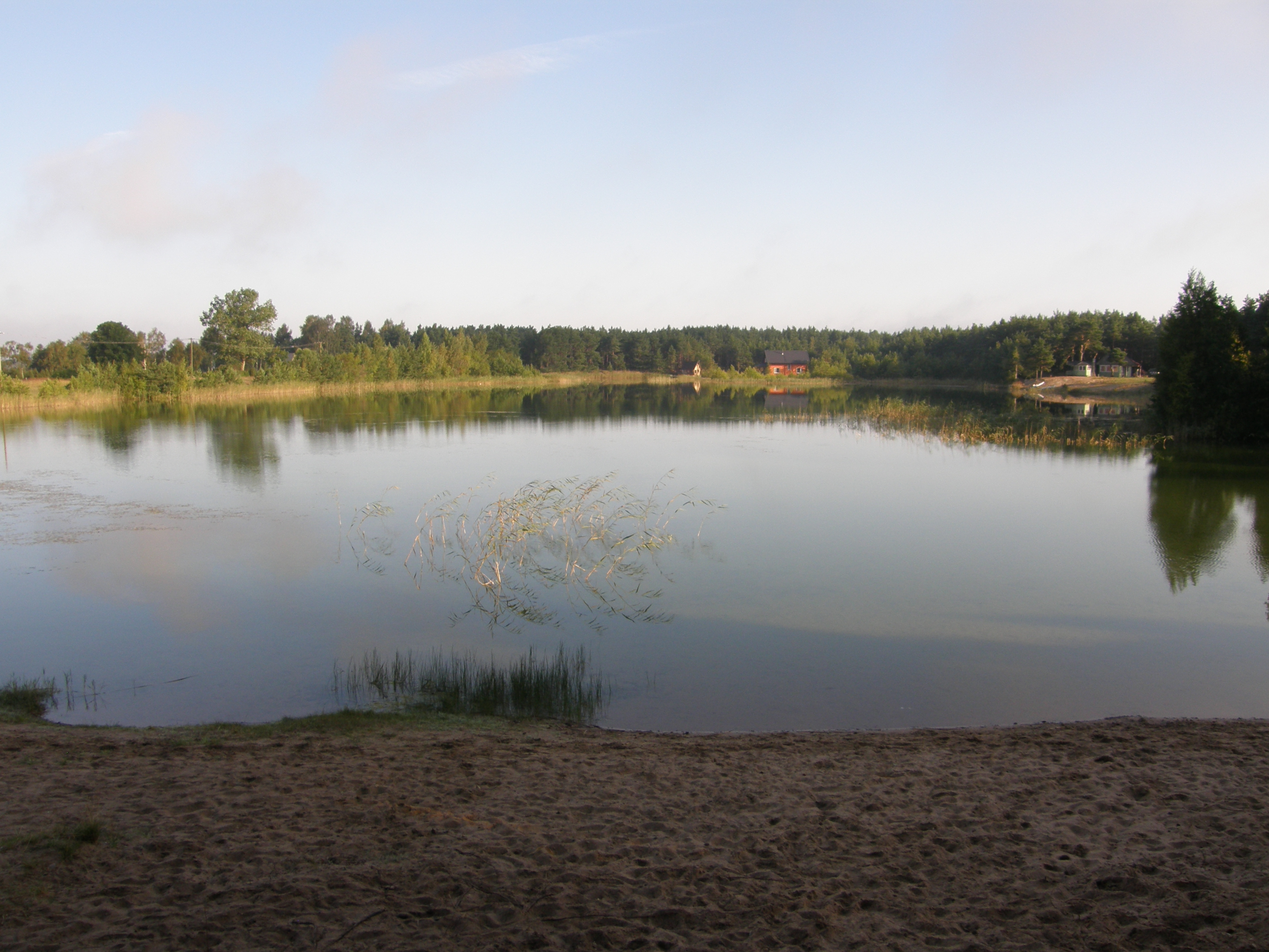 Tehumardi karjäär (tehisjärv) Saaremaal, Salme vallas. Foto tehtud augustis 2012